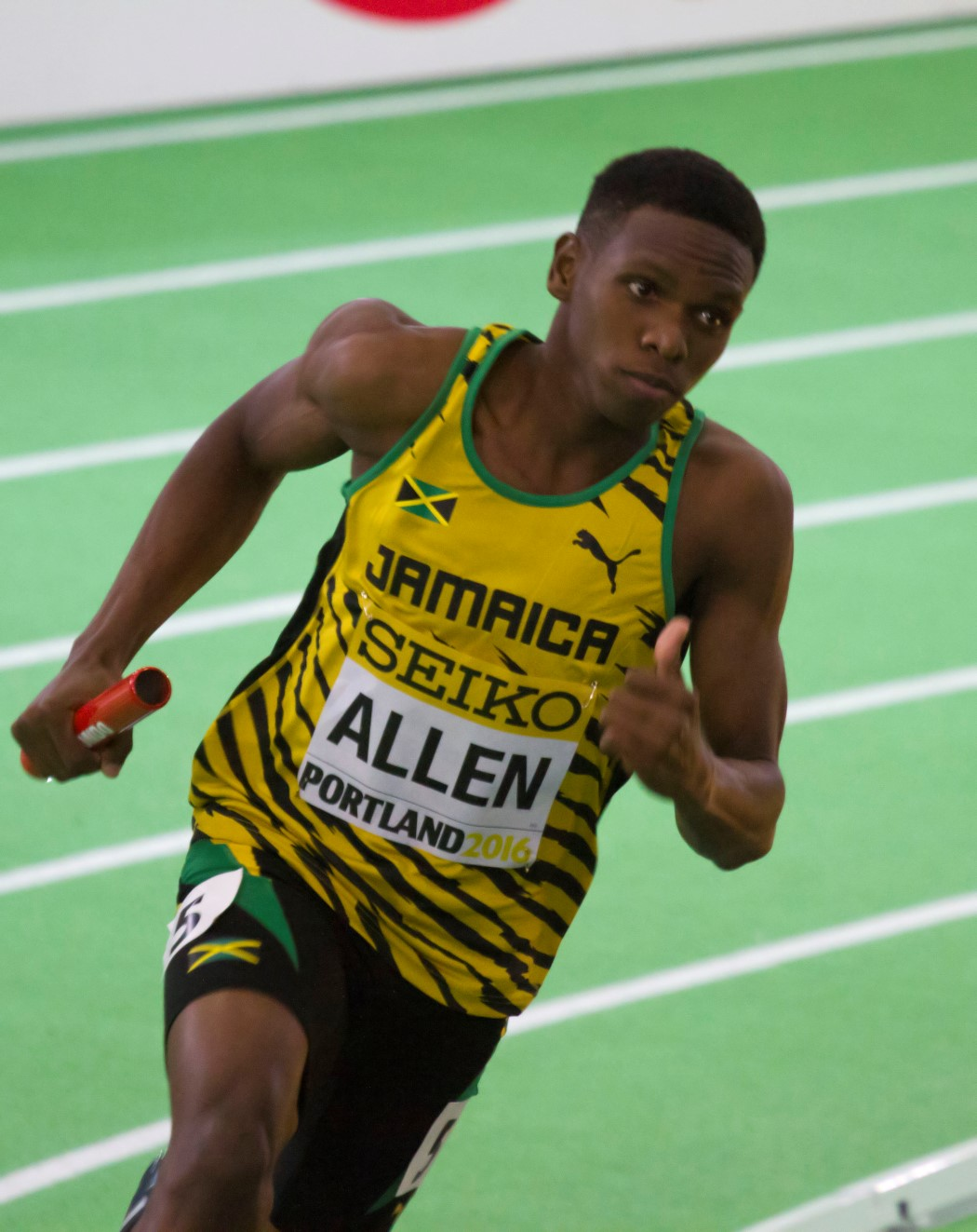 410reeksen 4x400 jamaica